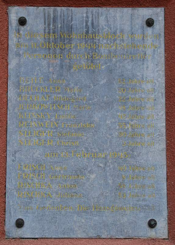 Reismann-Hof Gedenktafel Bombenopfer Gedenktafel im Reismann in Wien-Meidling zum Gedenken an die Opfer zweier Bombenangriffe am 11. Oktober 1944 und am 13. Februar 1945, enthüllt am 10. Oktober 1948. Wien 12., Am Fuchsenfeld 1–3